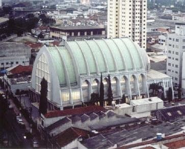 Sede Administrativa da Congregação Cristã no Brasil, no bairro do Brás, em São Paulo; Com capacidade de abrigar 6.675 fiéis sentados. Construido em 1948 e sua inauguração em 1954. Além da Casa de Oração, nela contém o prédio de administração e outro templo com capacidade de 2000 pessoas sentadas, que é utilizado para reuniões dos anciãos. Geralmente todas centrais da CCB contém estes anexos, com dormitórios, cozinhas industriais, farmácias, enfermarias, etc.